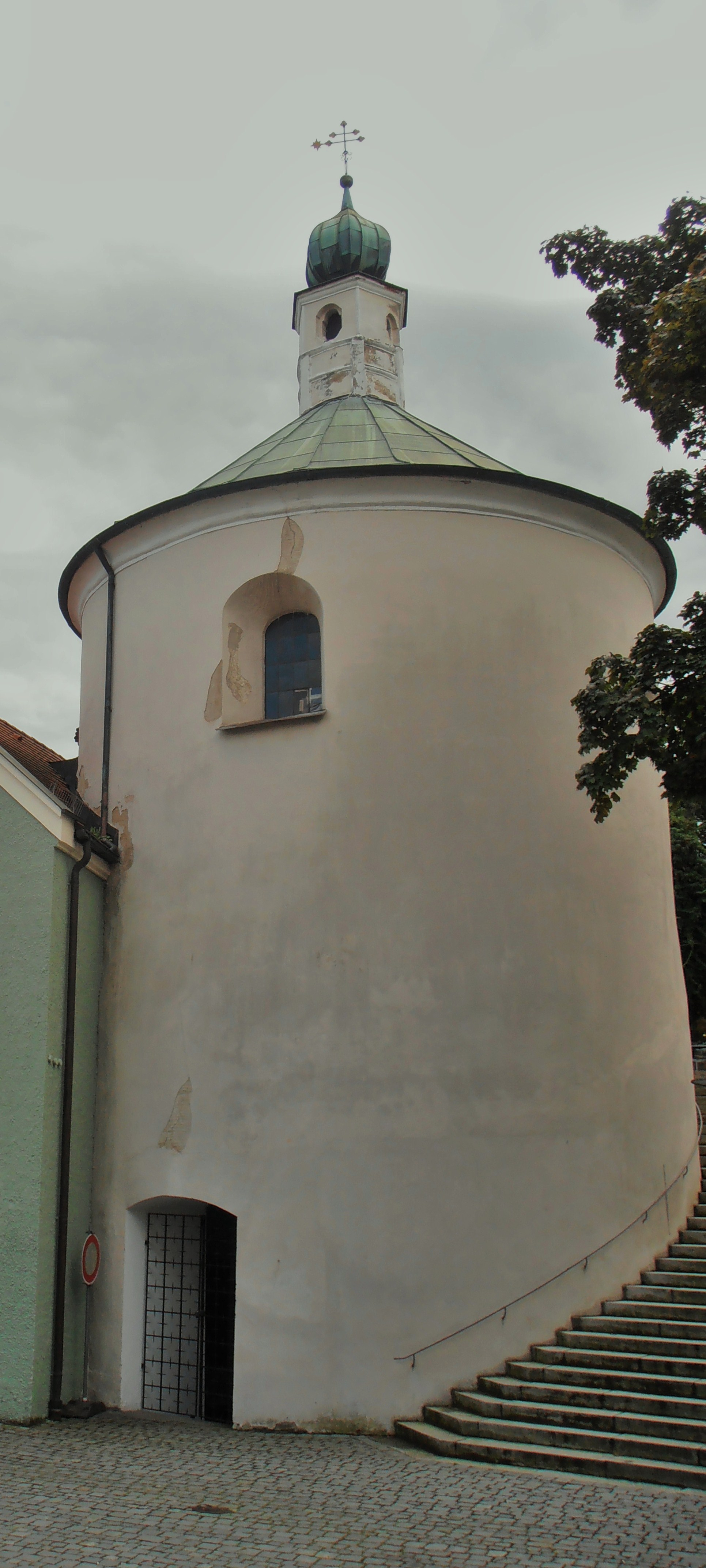 Josephikapelle in Roding: von unterhalb des Kirchplatzes sind beide Geschosse zu sehen